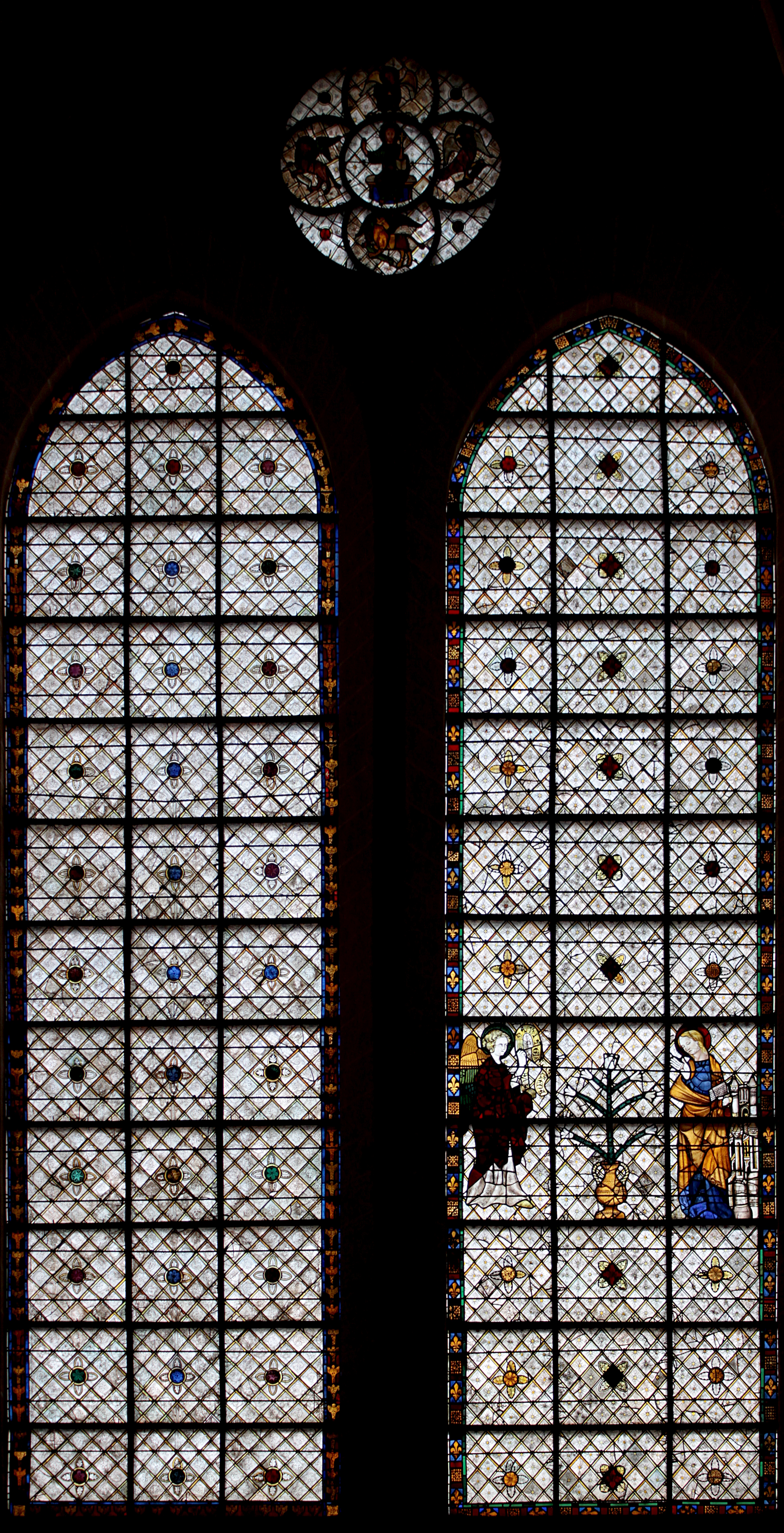 vitrail du déambulatoire de Chartres - baie 26 - vue d'ensemble.